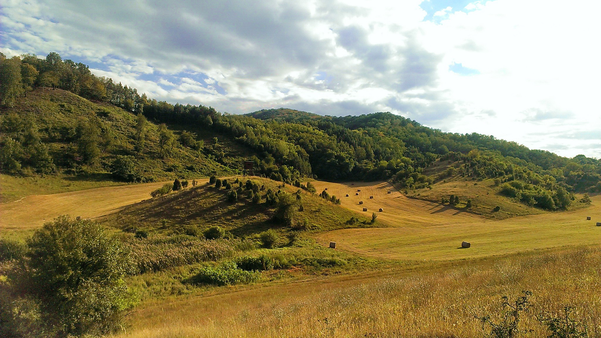 Cerová vrchovina